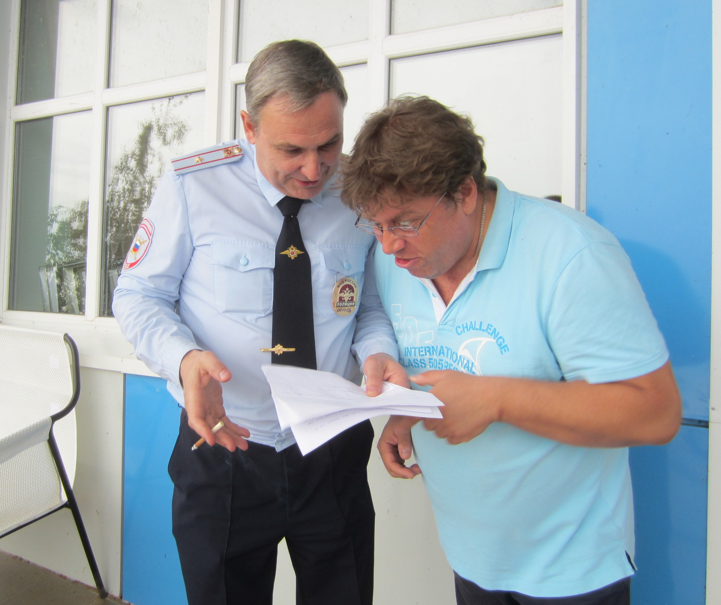 Кадр из к/ф "Секунды счастья" - 2017г.